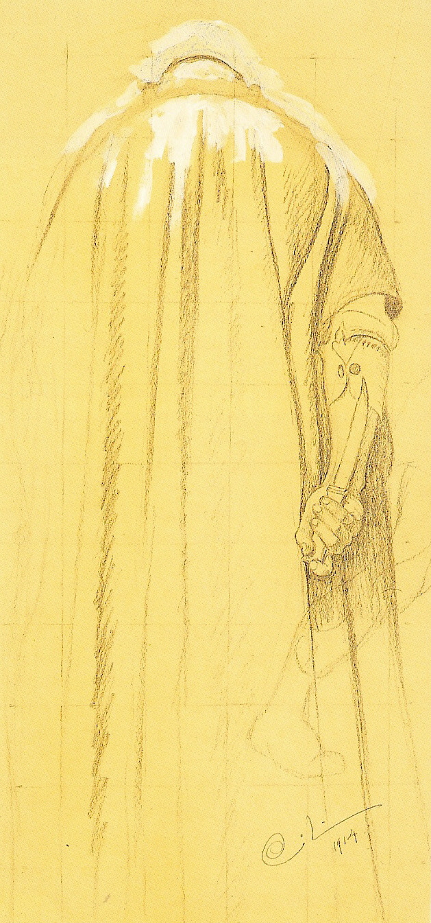 sketch